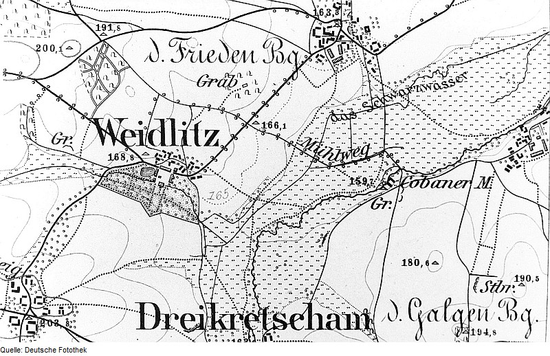 Original image description from the Deutsche Fotothek Neschwitz-Weidlitz. Meßtischblatt, Sekt. Kloster Marienstern, Nr. 37, 1884 (Sign.: VII 167)